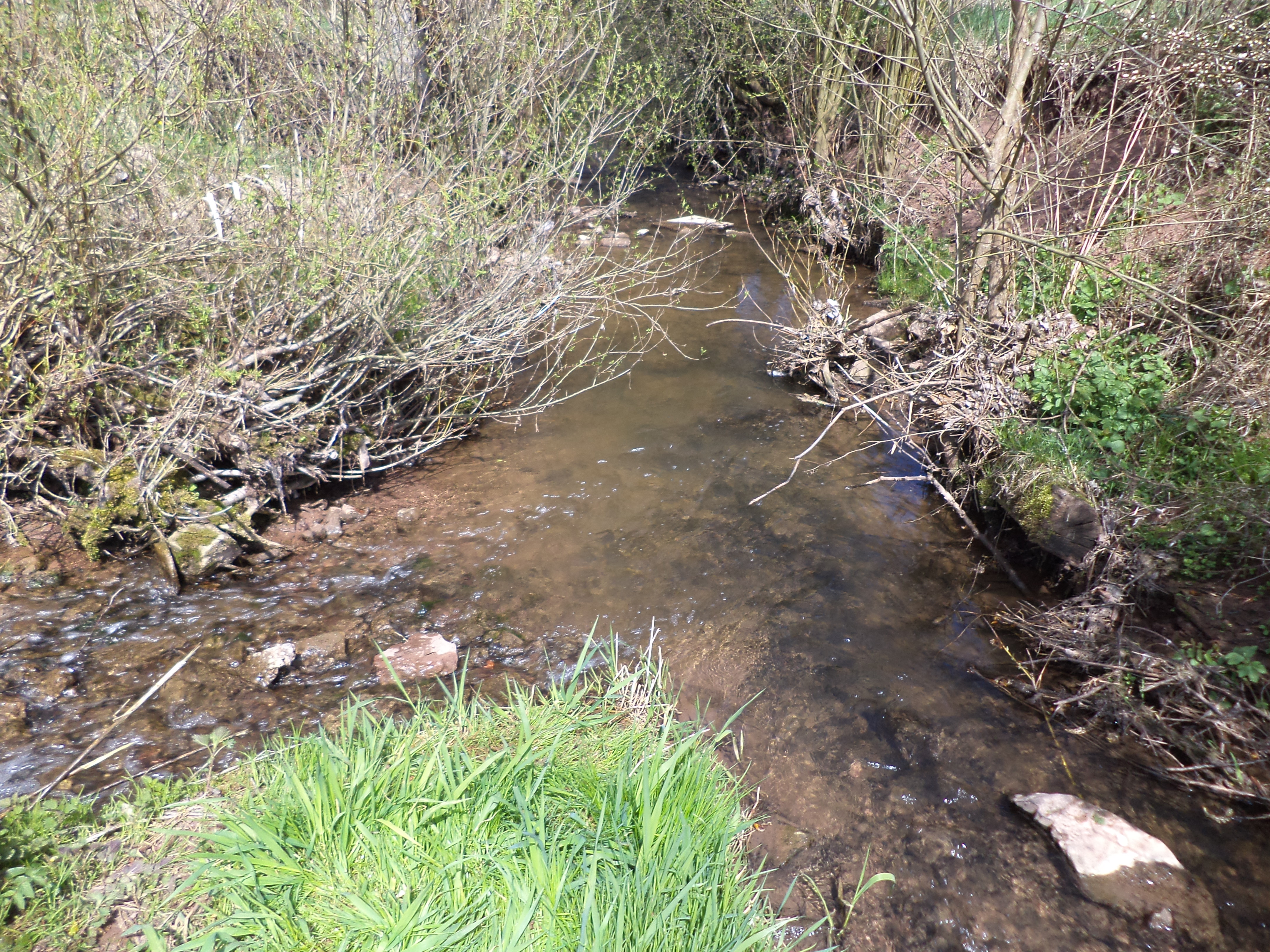 Der Wolperbach (links) mündet in die Kinzig (von vorne rechts nach hinten)